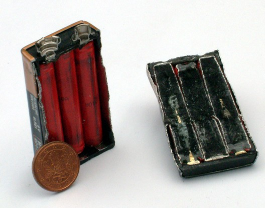 Querschnitt durch eine 9 V Alkali-Mangan Blockbatterie. Urheber des Photos: Anton (rp) 2004 Nutzungsrechte freigegeben: GNU Free Documentation License.